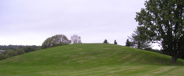 Oseberghaugen in Vestfold, Norway.